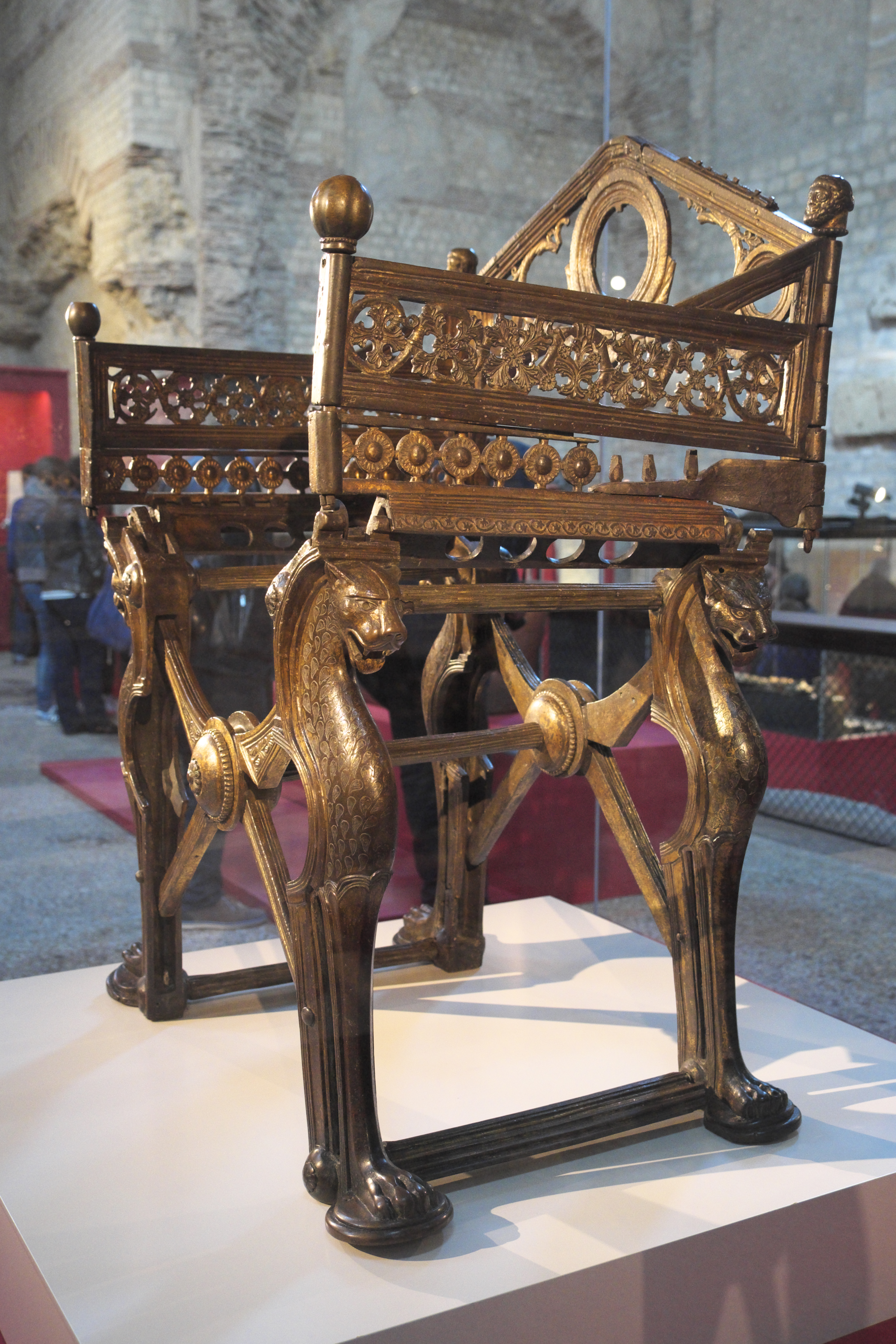 Musée national du Moyen Âge (Musée de Cluny) im 5. Arrondissement in Paris, Ausstellung: Les Temps mérovingiens; sogenannter Thron des Königs Dagobert, aus dem 8./9. Jahrhundert